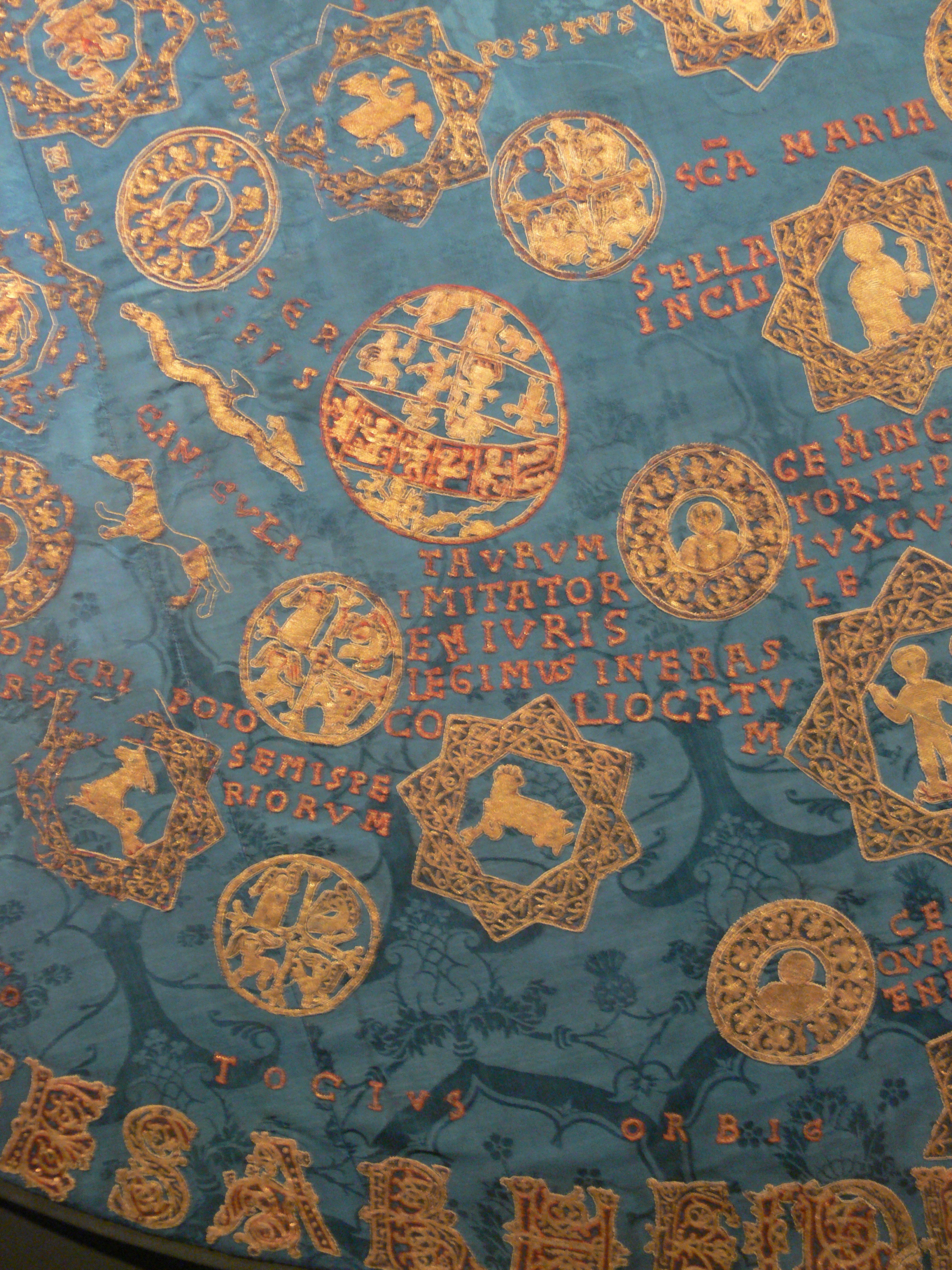 Sternenmantel Kaiser Heinrichs II. Stickereien: Regensburg, um 1018–1024, Trägerstoff: Italien, um 1453. Diözesanmuseum Bamberg (2728/3–6)